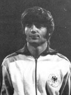 Friedhelm Haebermann, Edgar Schneider und Jürgen Kalb vor dem Amateur-Länderspiel am 7. September 1971 in München gegen Bulgarien